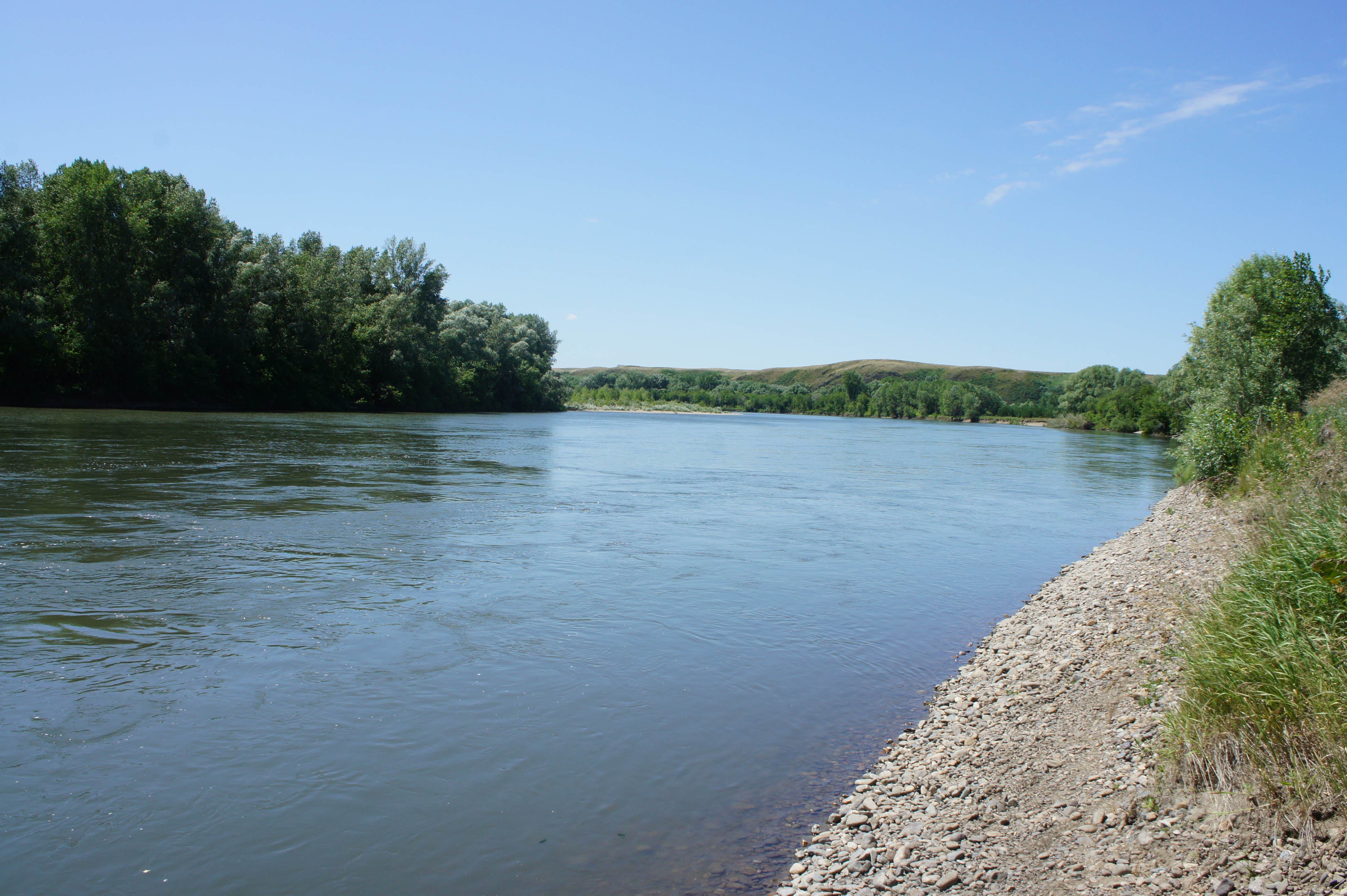 Чарыш возле с. Краснощёково